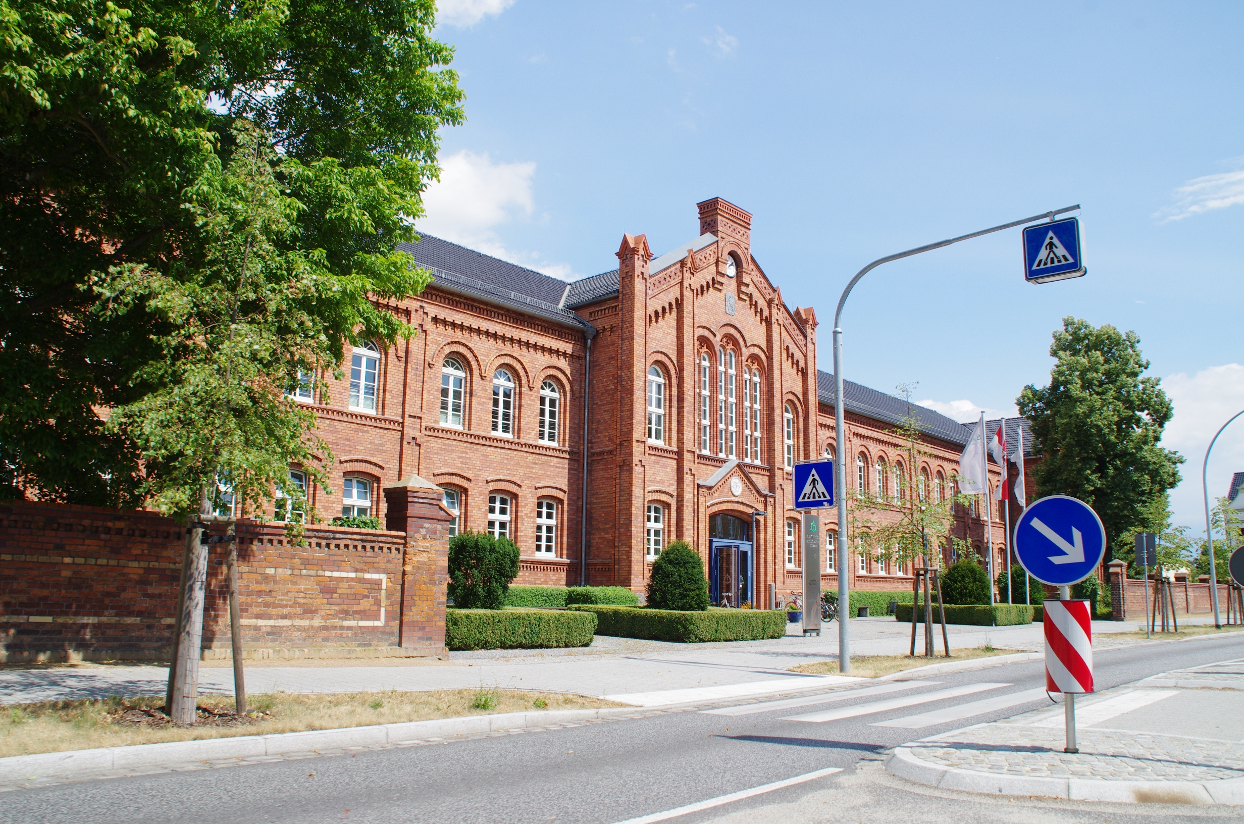 Lübben in Brandenburg. Das Haus in der Bahnhofstraße (Asklepios Fachklinikum Lübben) steht unter Denkmalschutz.